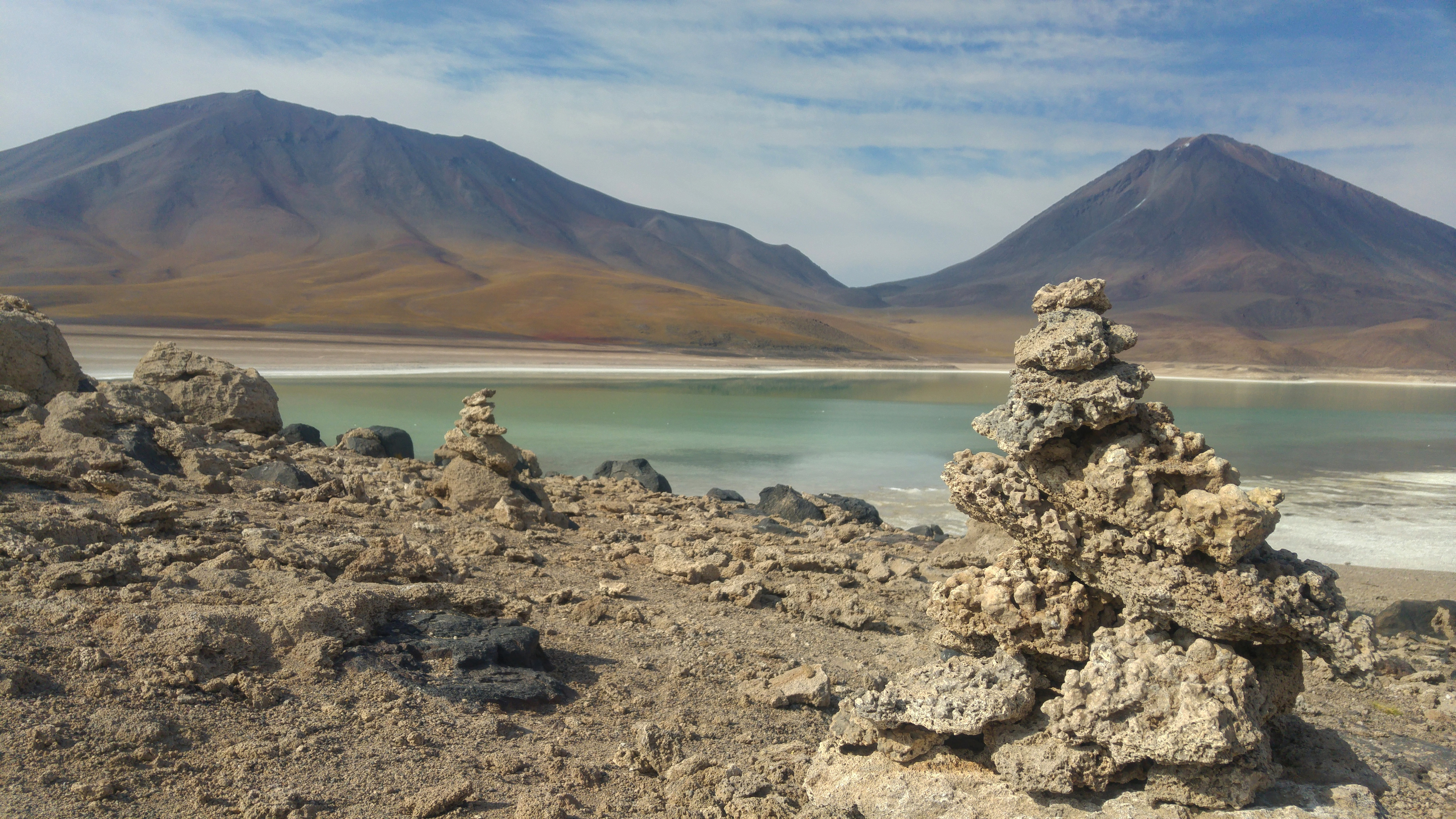 Apu al costado de la Laguna